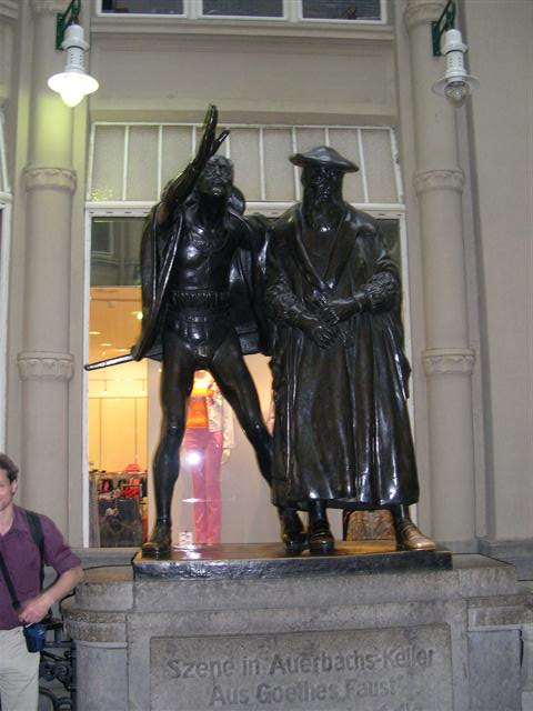 Szene in Auerbachs Keller Die Skulptur befindet sich dauerhaft an der Mädlerpassage vor dem Eingang zur Gaststätte "Auerbachs Keller" in Leipzig, einem öffentlichen Weg, und wurde im Rahmen der Panoramafreiheit fotografiert. Siehe auch (Dort ist ein ähnliches Foto von Rössing, Roger & Rössing, Renate,)